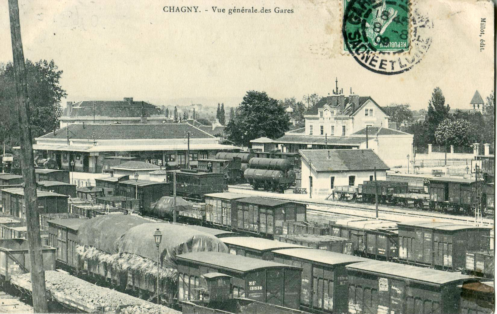 Carte postale ancienne éditée par Millot : CHAGNY - Vue générale des Gares